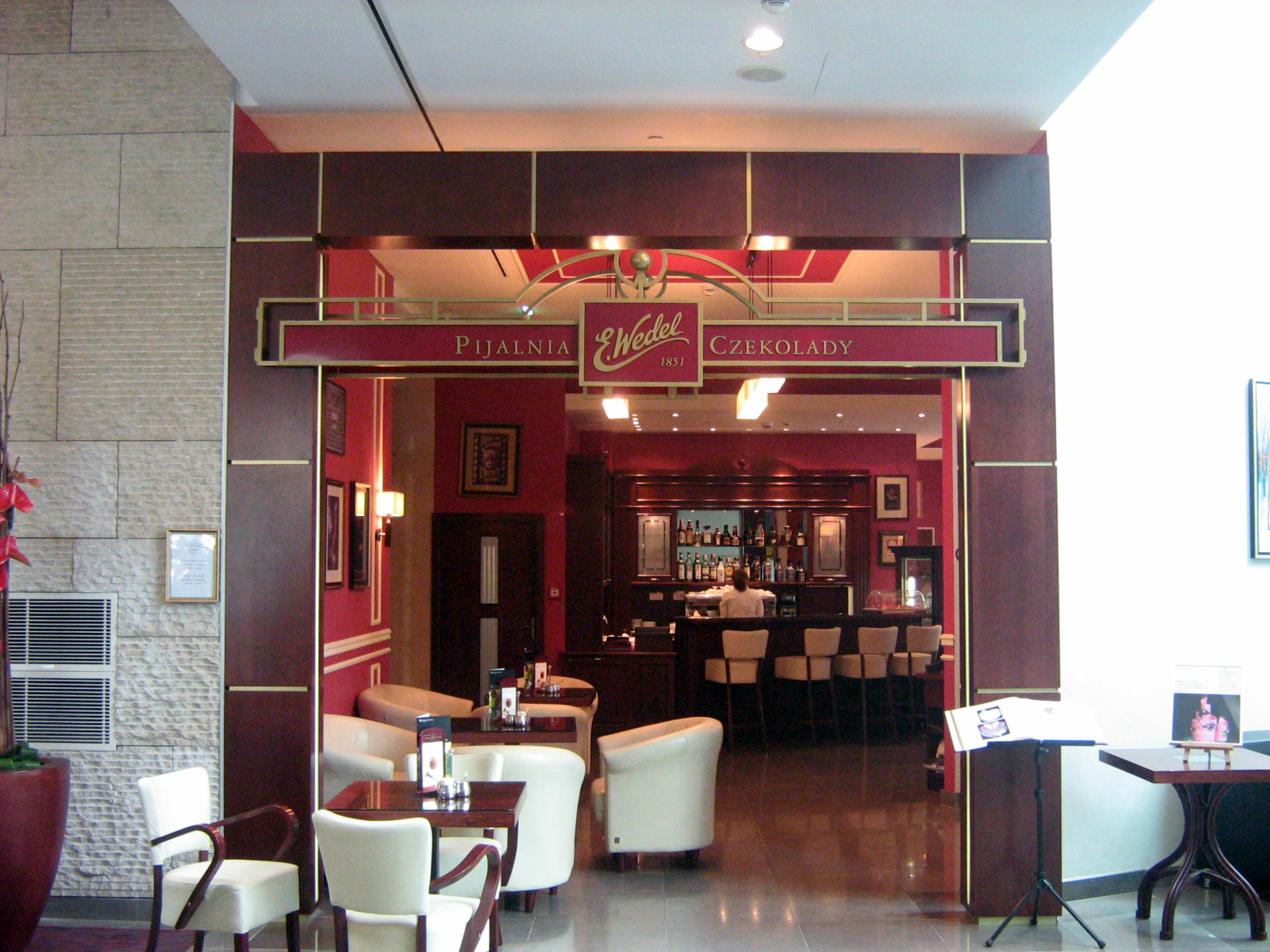 Widok z poziomu GP w Hotelu InterContinentalu Warszawa.